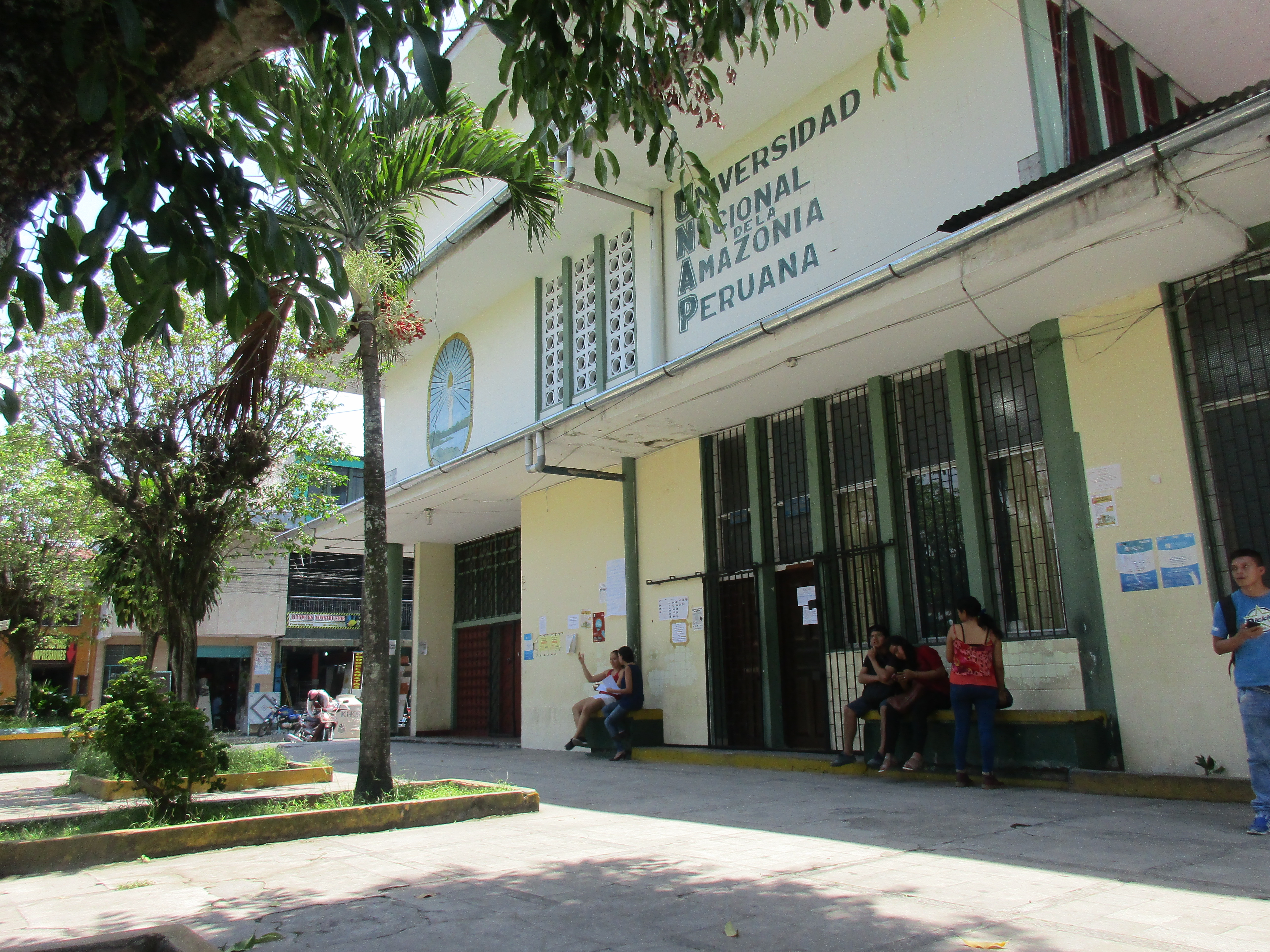 Universidad Nacional de la Amazonía Peruana